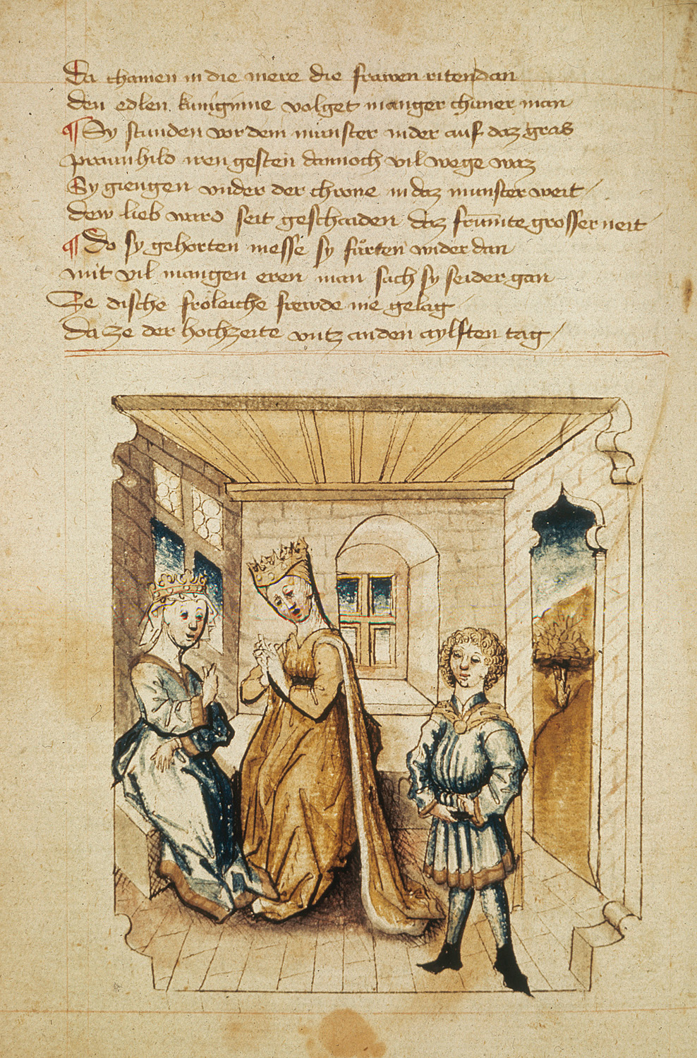 Nibelungenlied. Hundeshagenscher Kodex